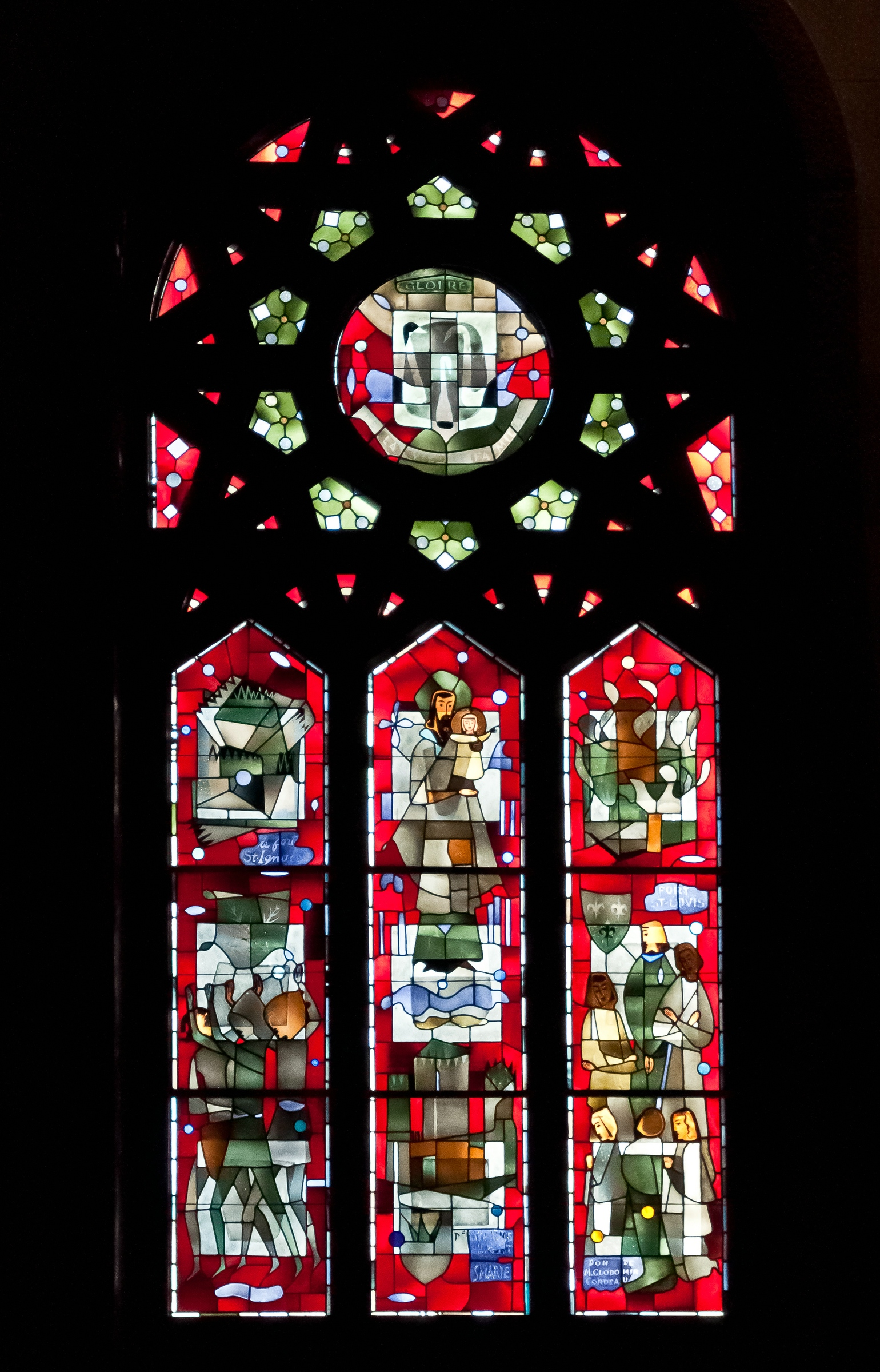 Oratoire Saint-Joseph du Mont-Royal, 3800, chemin Queen Mary, (Canada). (Protection LHN. Voir la liste des lieux patrimoniaux de Montréal pour plus de détails).